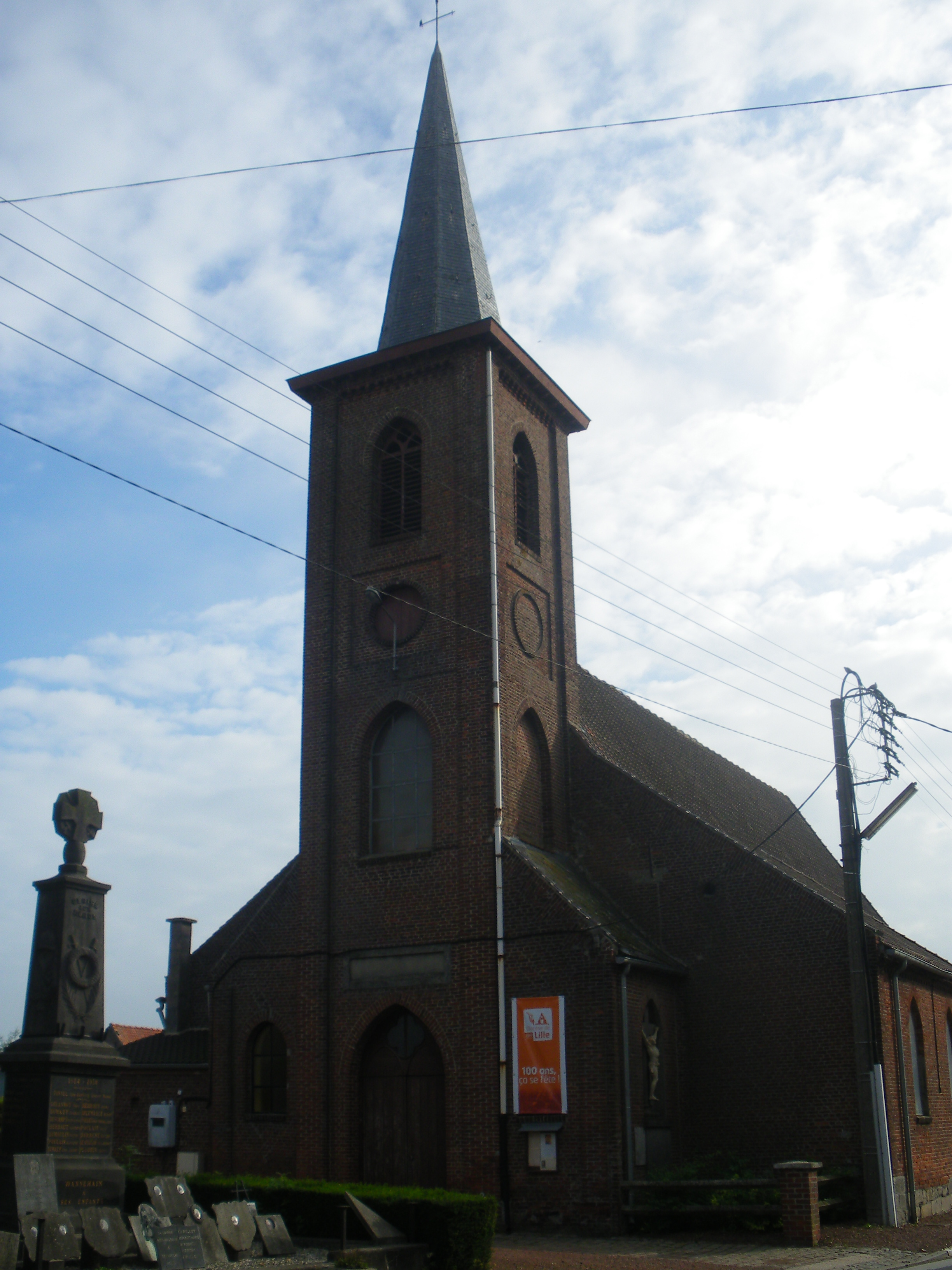 Vue de l'église Sainte-Cécile de Wannehain dans le département du Nord.